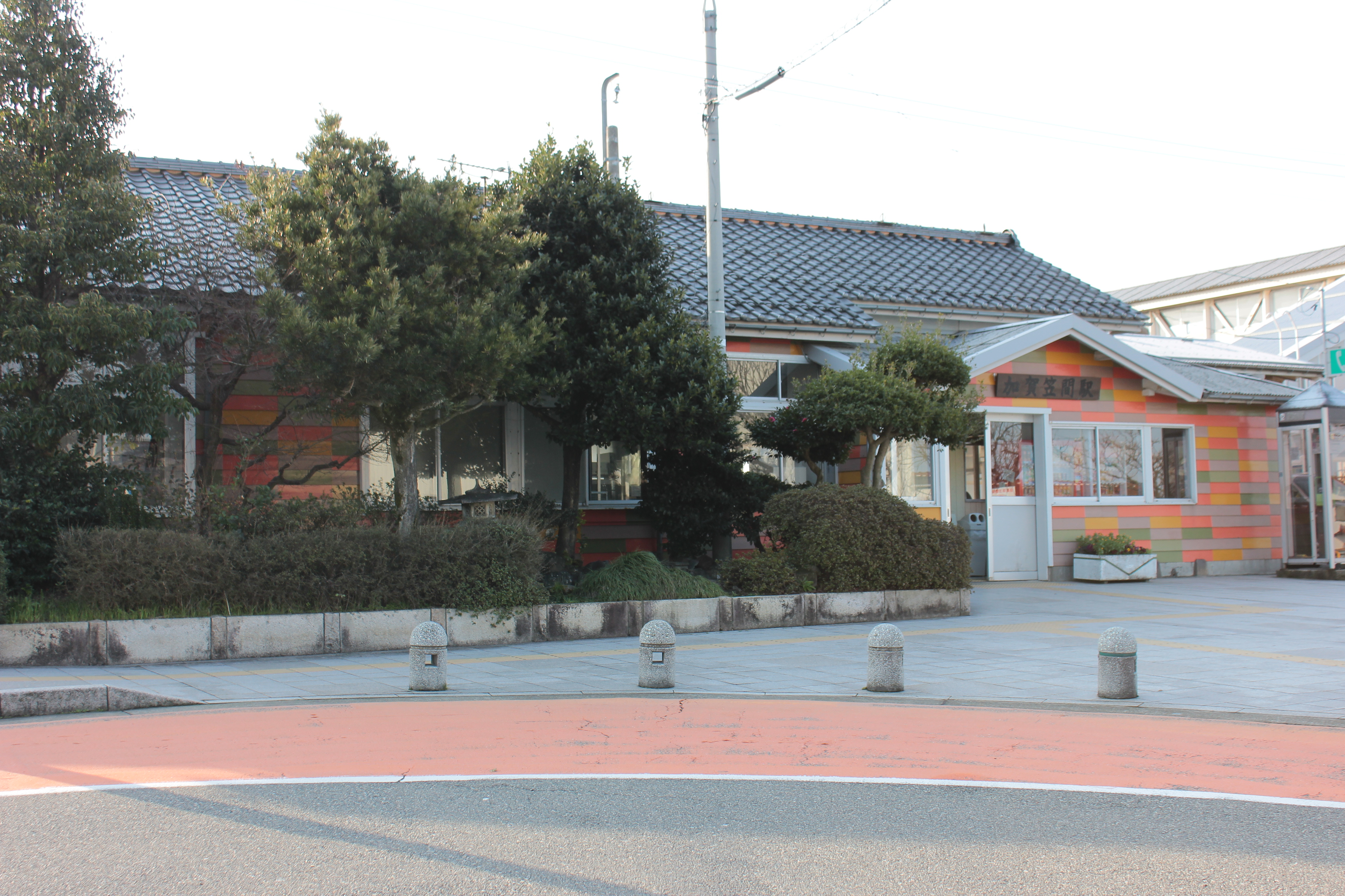 加賀笠間駅（石川県白山市） Canon EOS Kiss X5